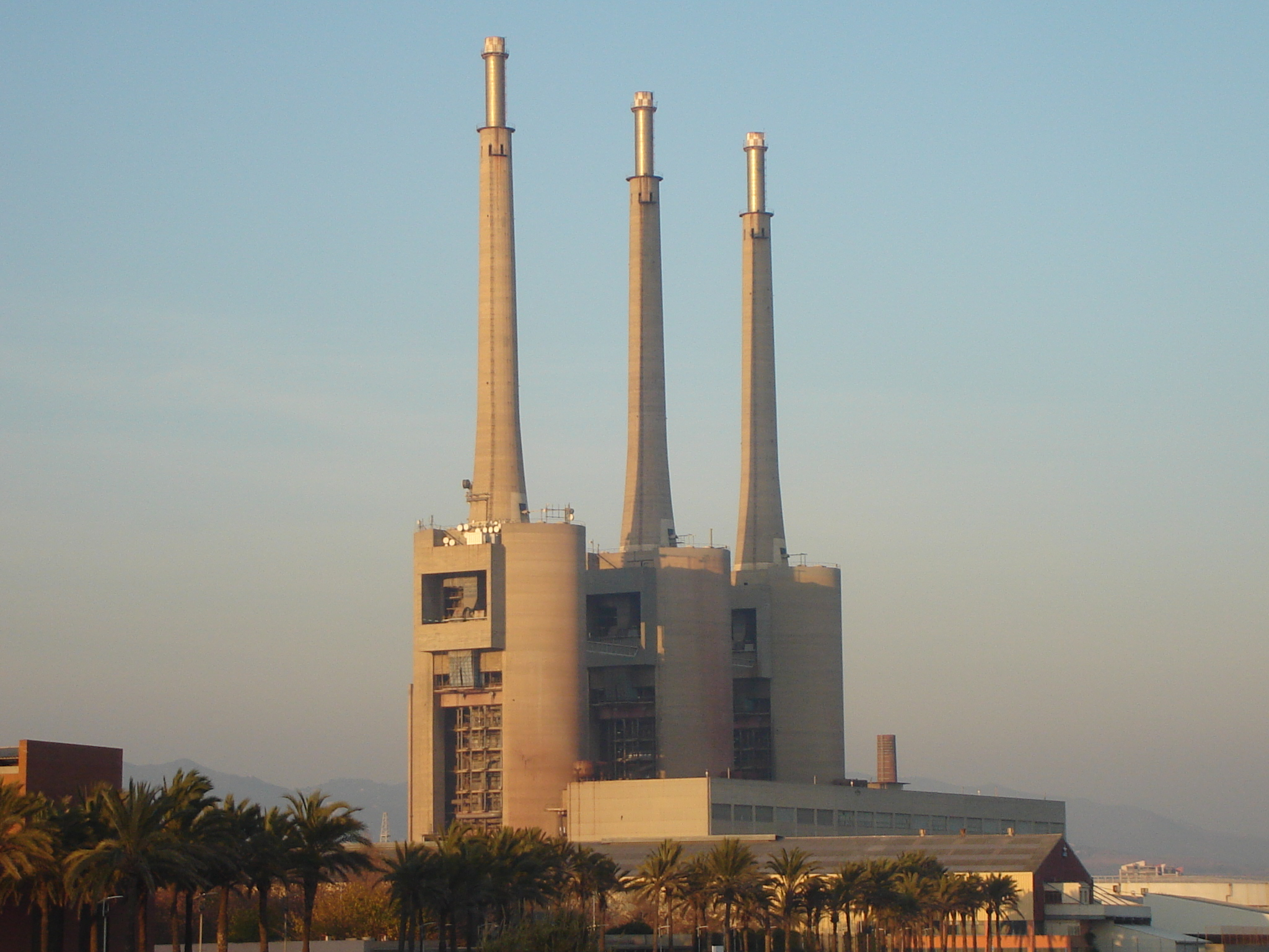 Las tres chimeneas de Badalona-Sant Adrià